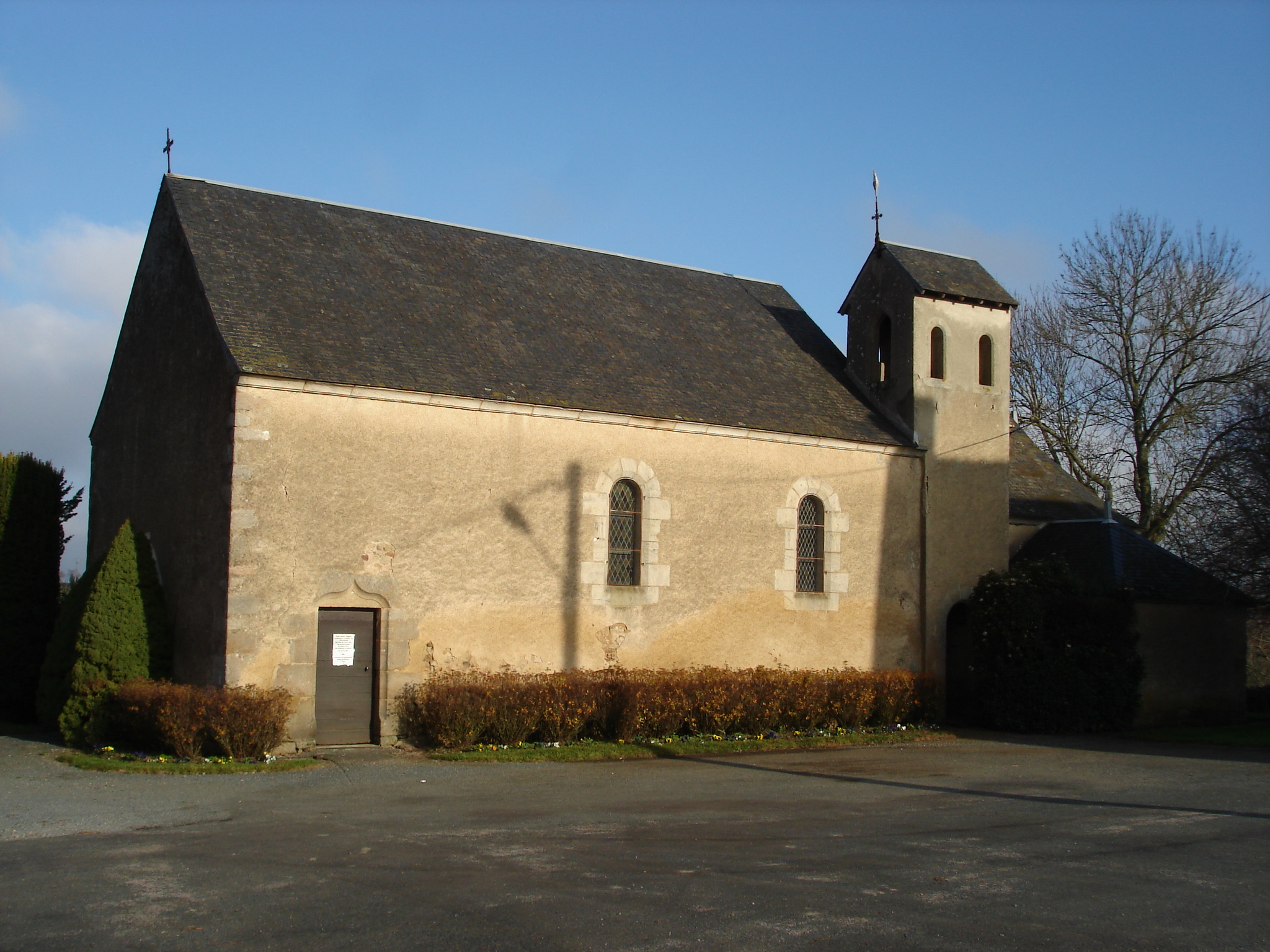 Pouligny-Saint-Martin (36) : L'église.